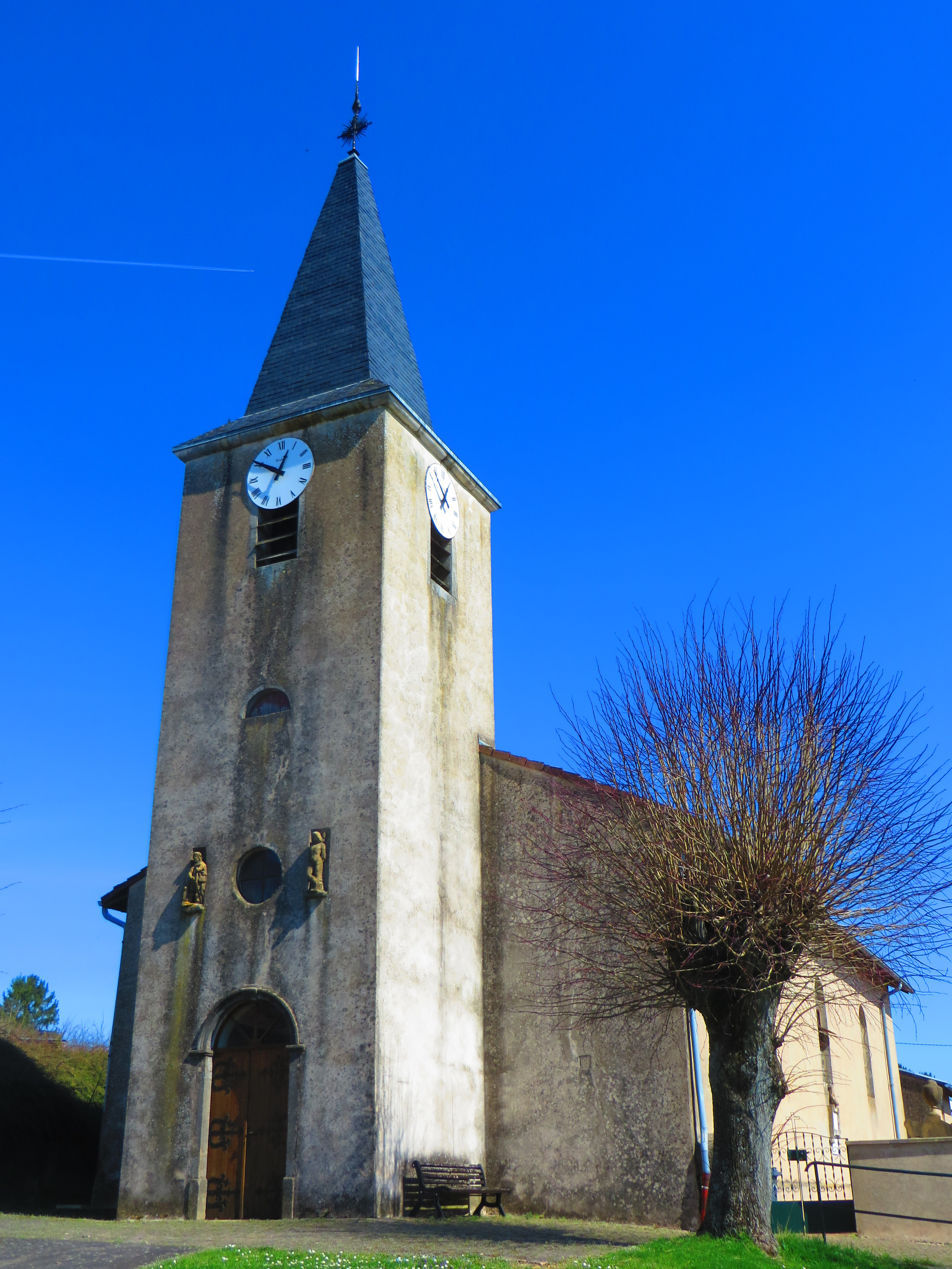 Chanville Église de la Sainte-Croix